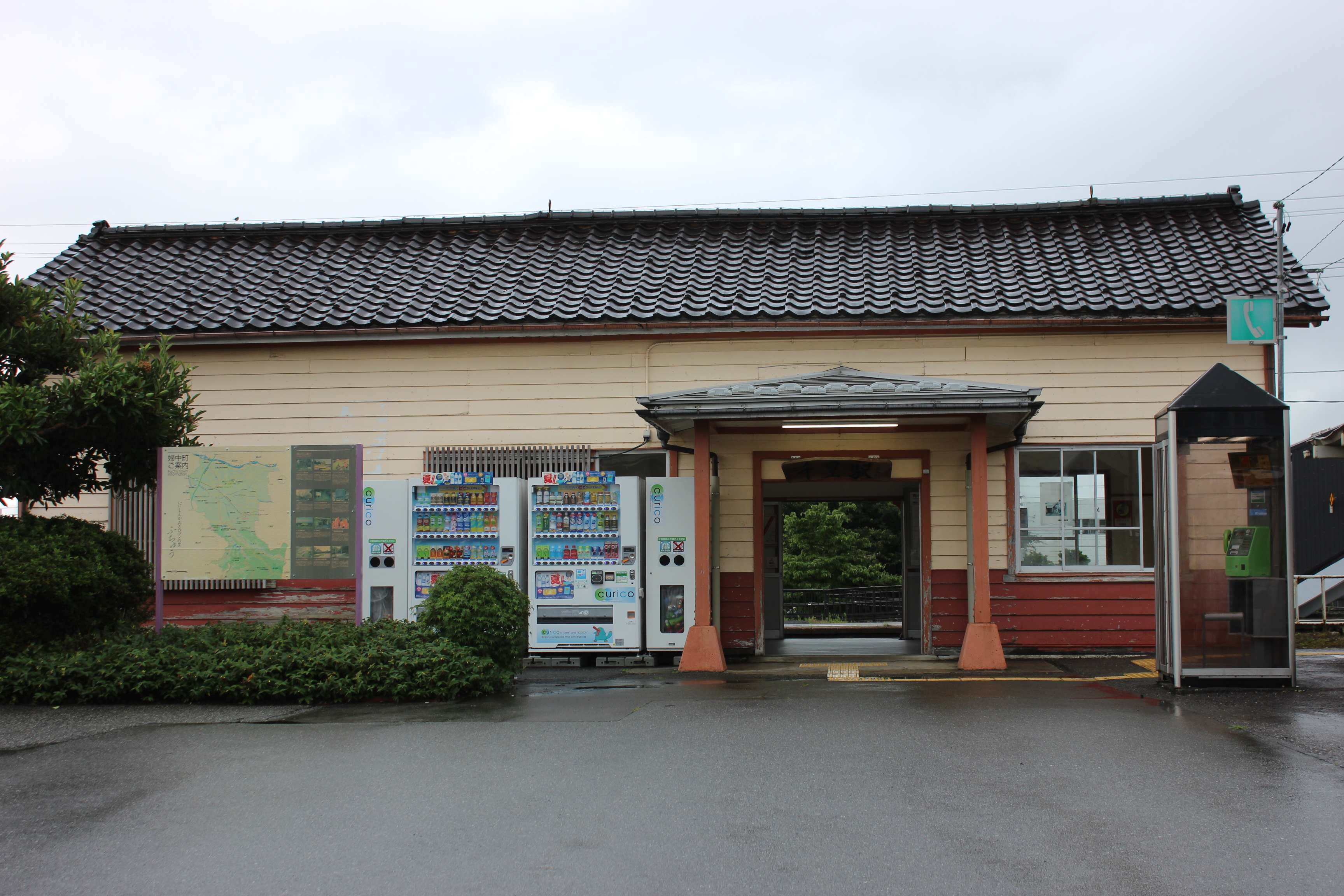 千里駅（富山県富山市） Canon EOS Kiss X5